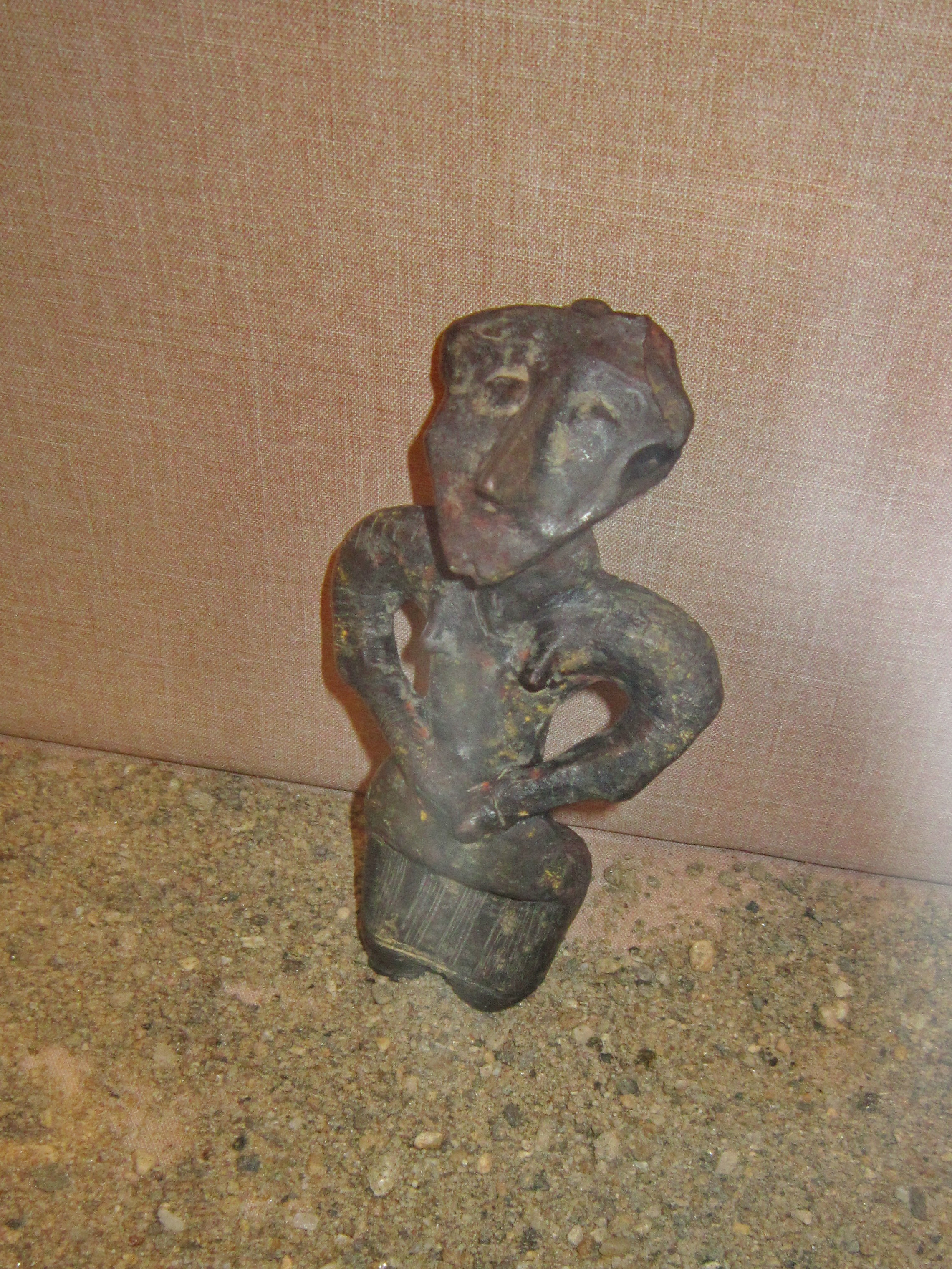 Српски (ћирилица): Археолошко налазиште Плочник